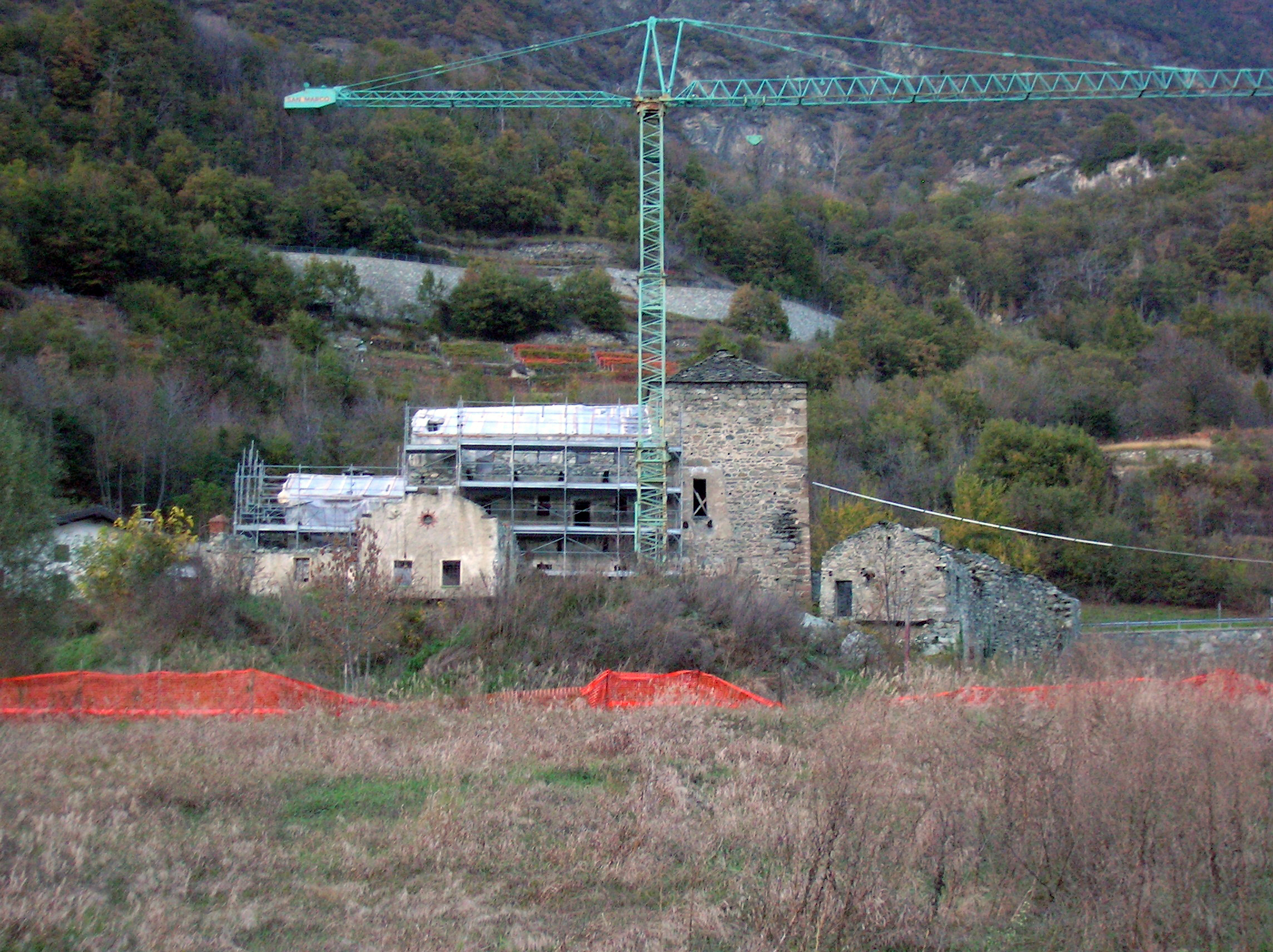 Torre di Néran durante il restauro, Châtillon, Valle d'Aosta, Italia.